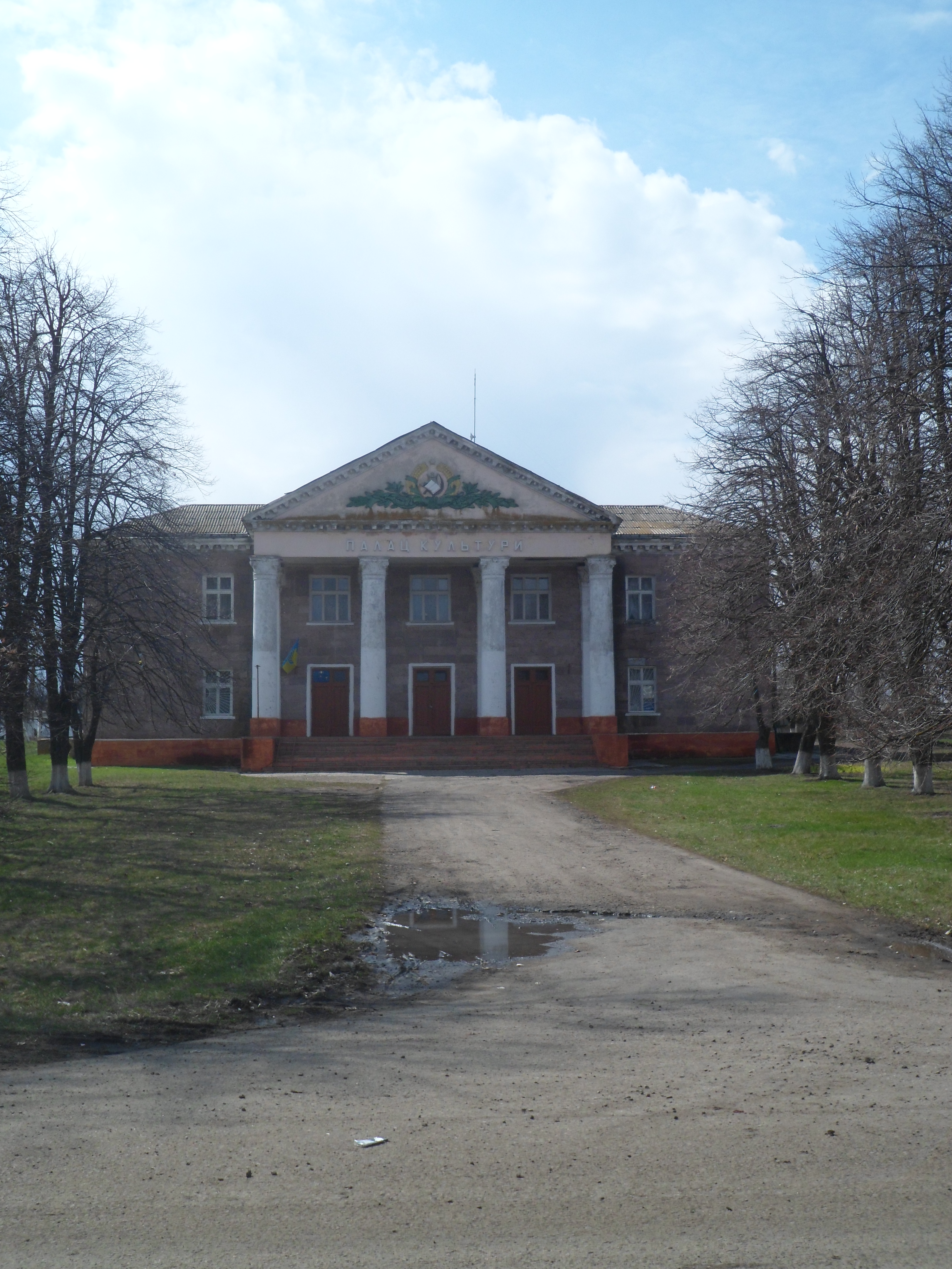 Дом культуры с.Старые Маяки. Старомаяковский сельсовет.